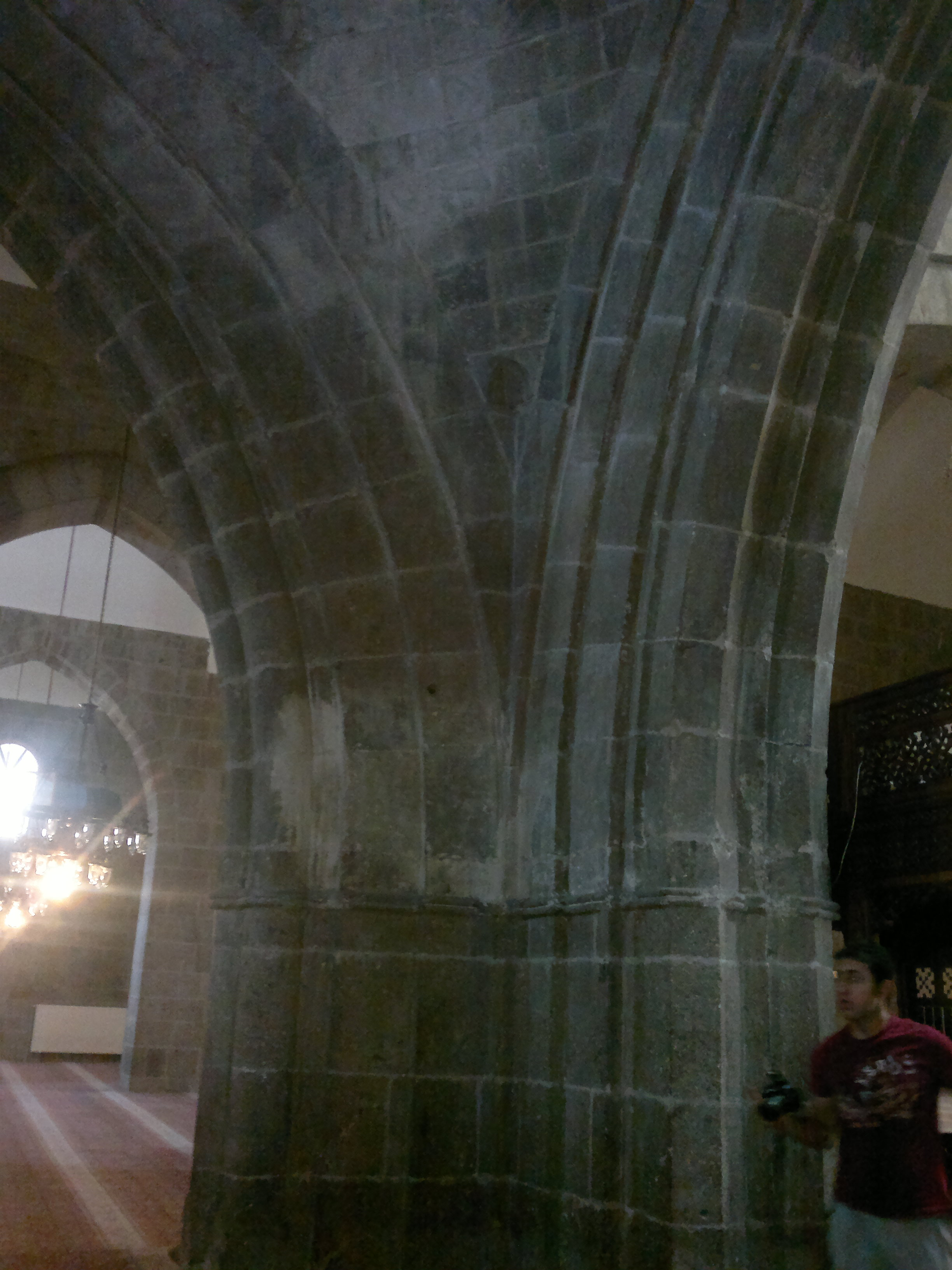 Erzurum Ulu Camii Filayağı Sütun